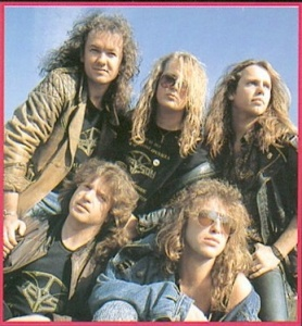 Kreyson